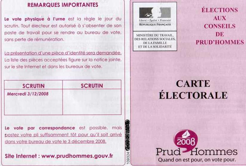 carte électorale pour les élections aux conseils de prud'hommes